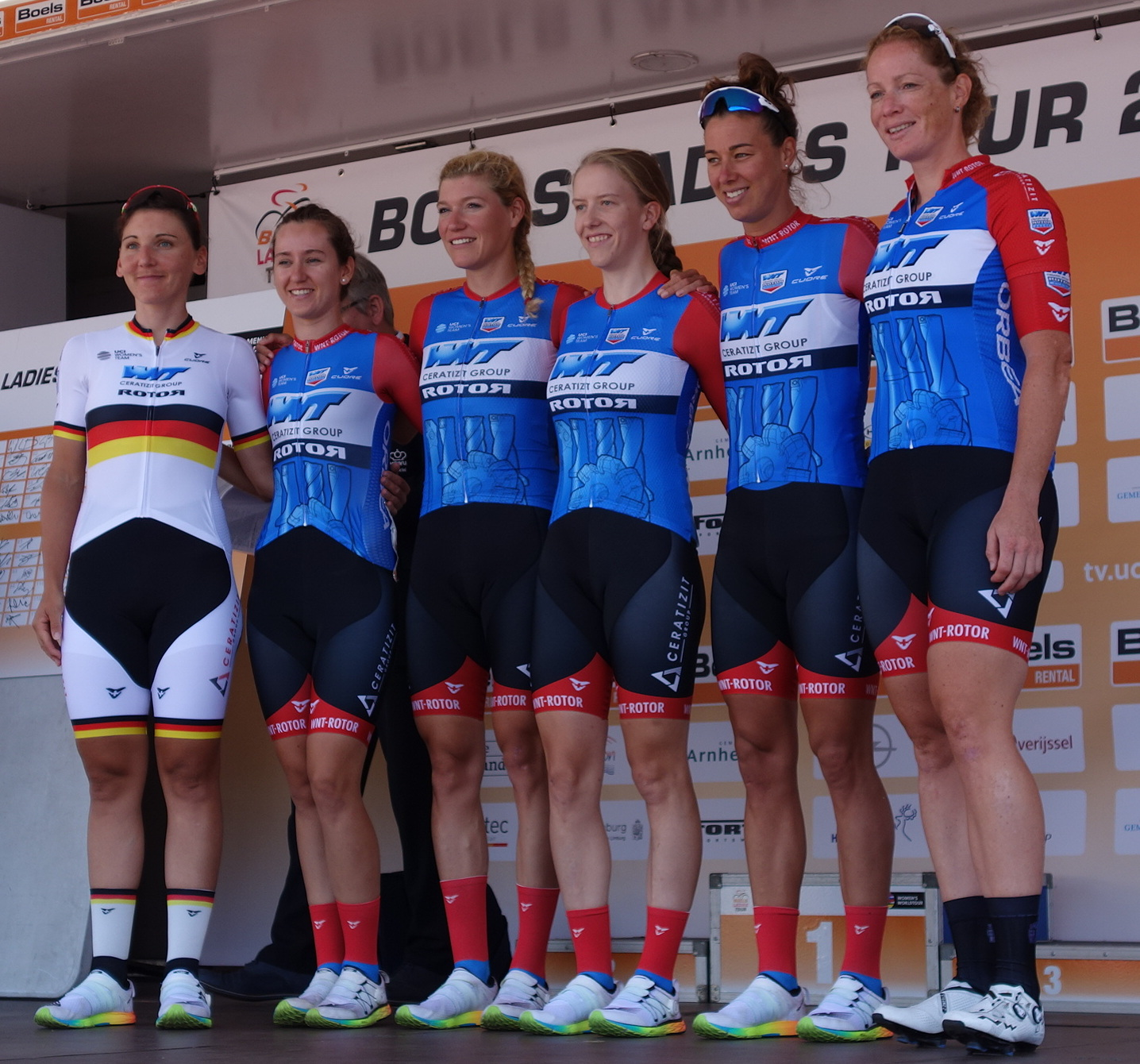 WNT-Rotor bij de start van de eerste etappe van Stramproy naar Weert in de Boels Ladies Tour 2019